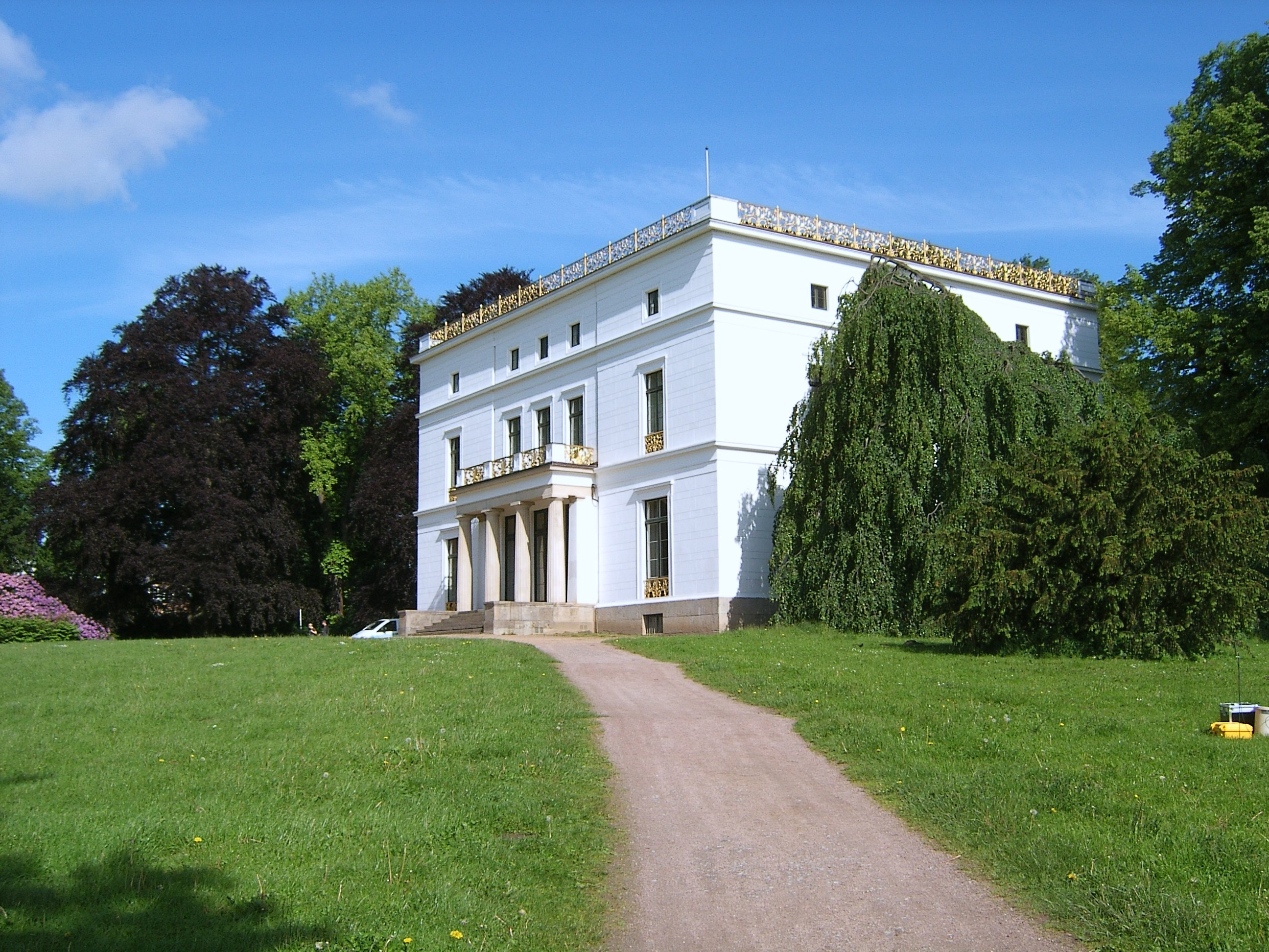 Hamburg, Jenischpark, Jenisch-Haus